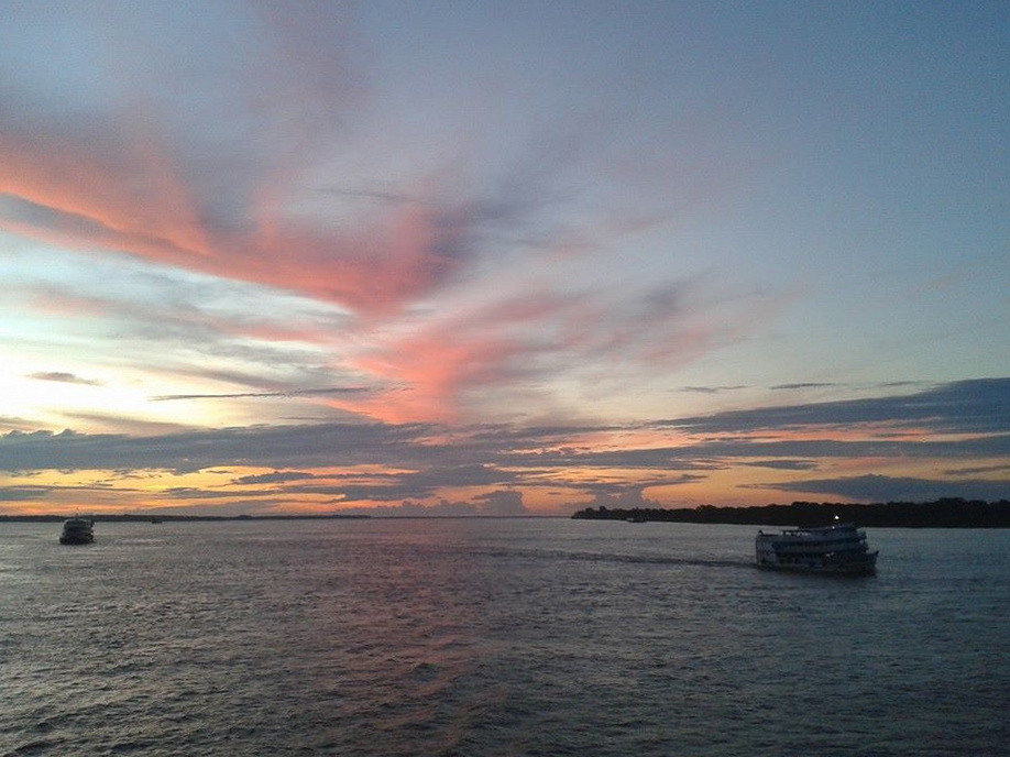 Navegando no Rio Amazonas, próxima a Parintins-AM